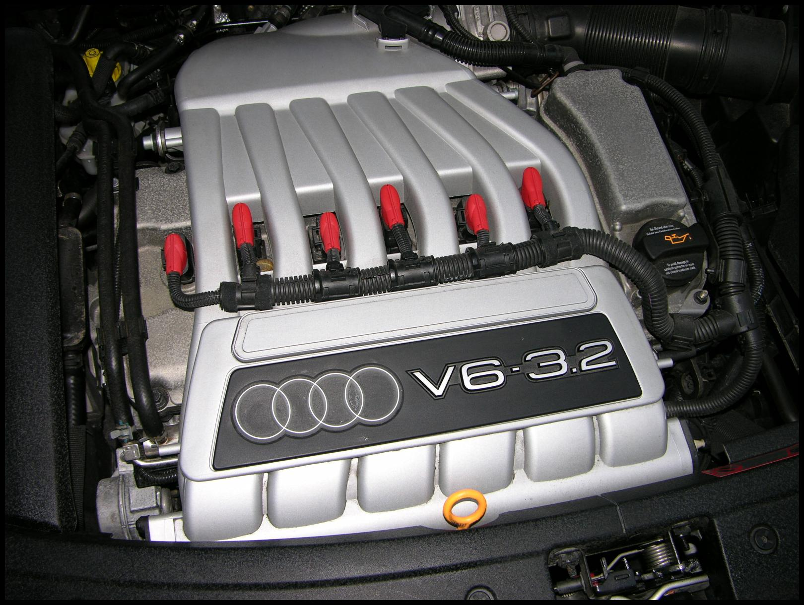 Audi TT 3.2 Roadster